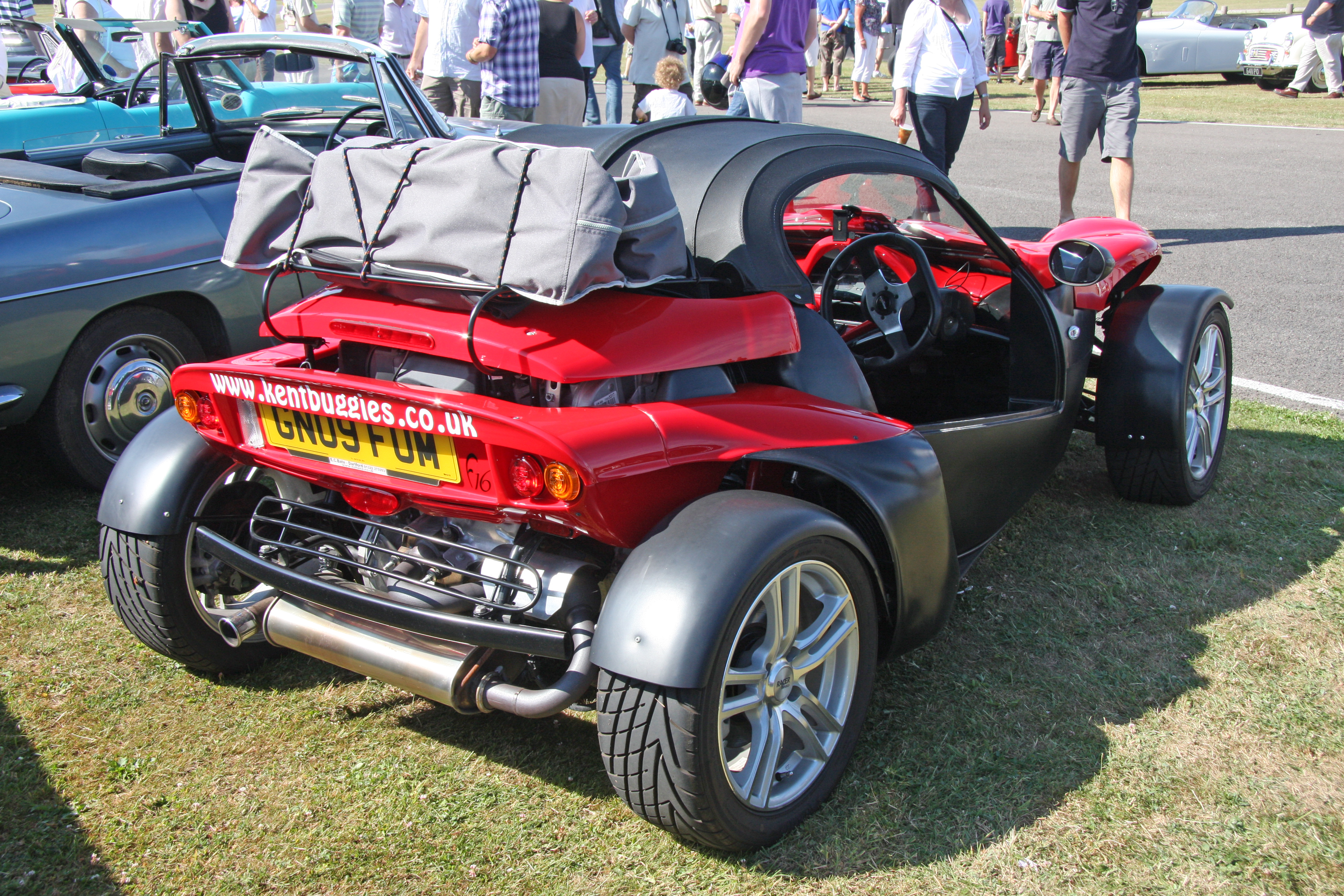 Secma F16 Sport